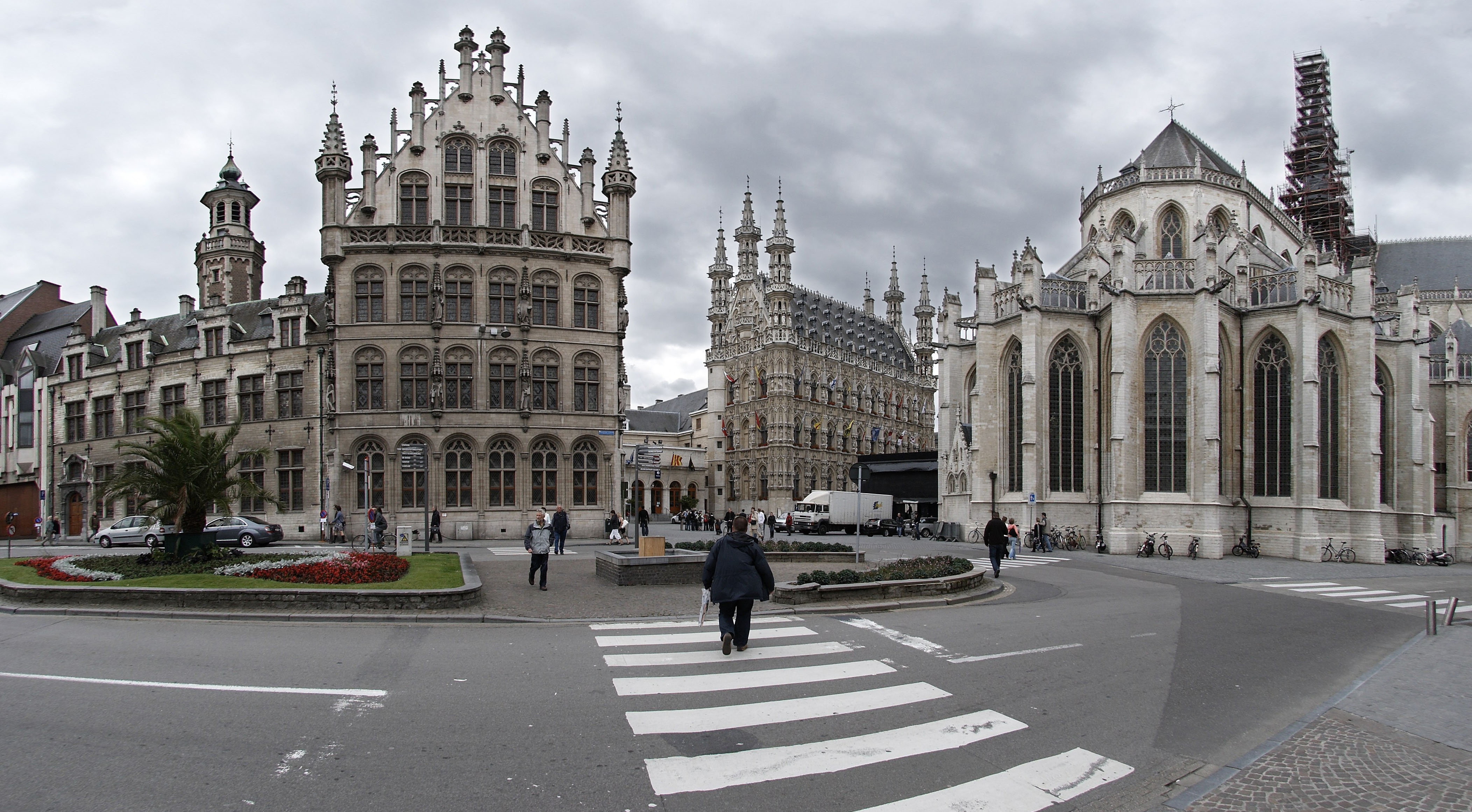 gezien vanaf Maarschalk Fochplein o.a. Tafelrond, gemeentehuis en de Collegiale Sint-Pieterskerk te Leuven. Kijkrichting zuid-west.